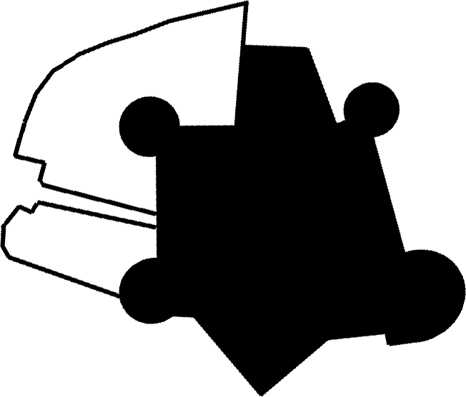 castello di taranto visto dall'alto